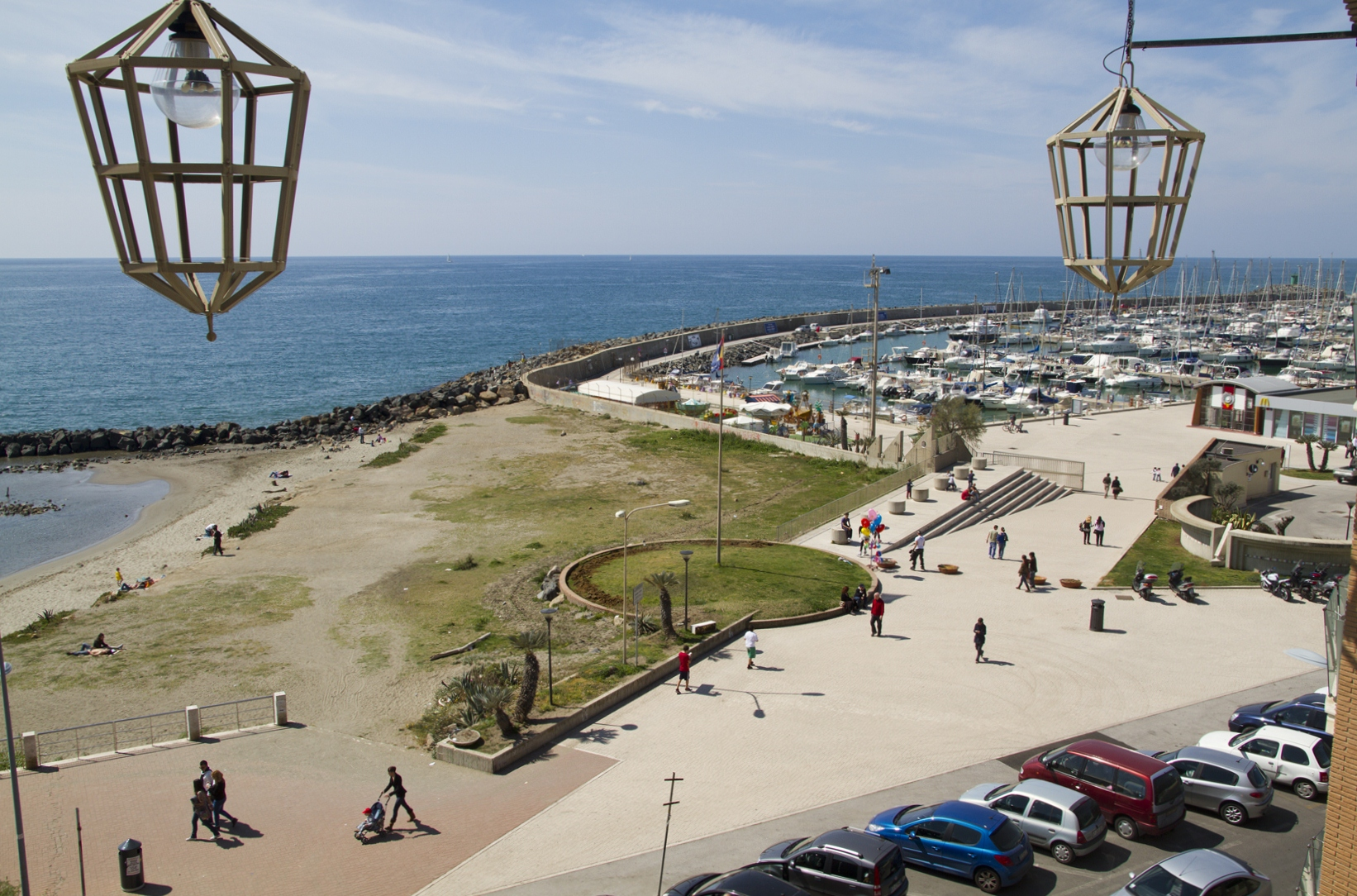 Ostia porto Turistica